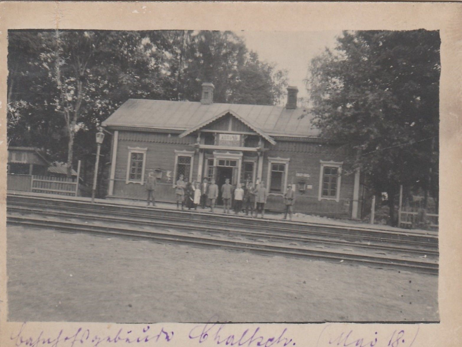 Беларуская (тарашкевіца): Хальч (Chalč). Чыгуначная станцыя